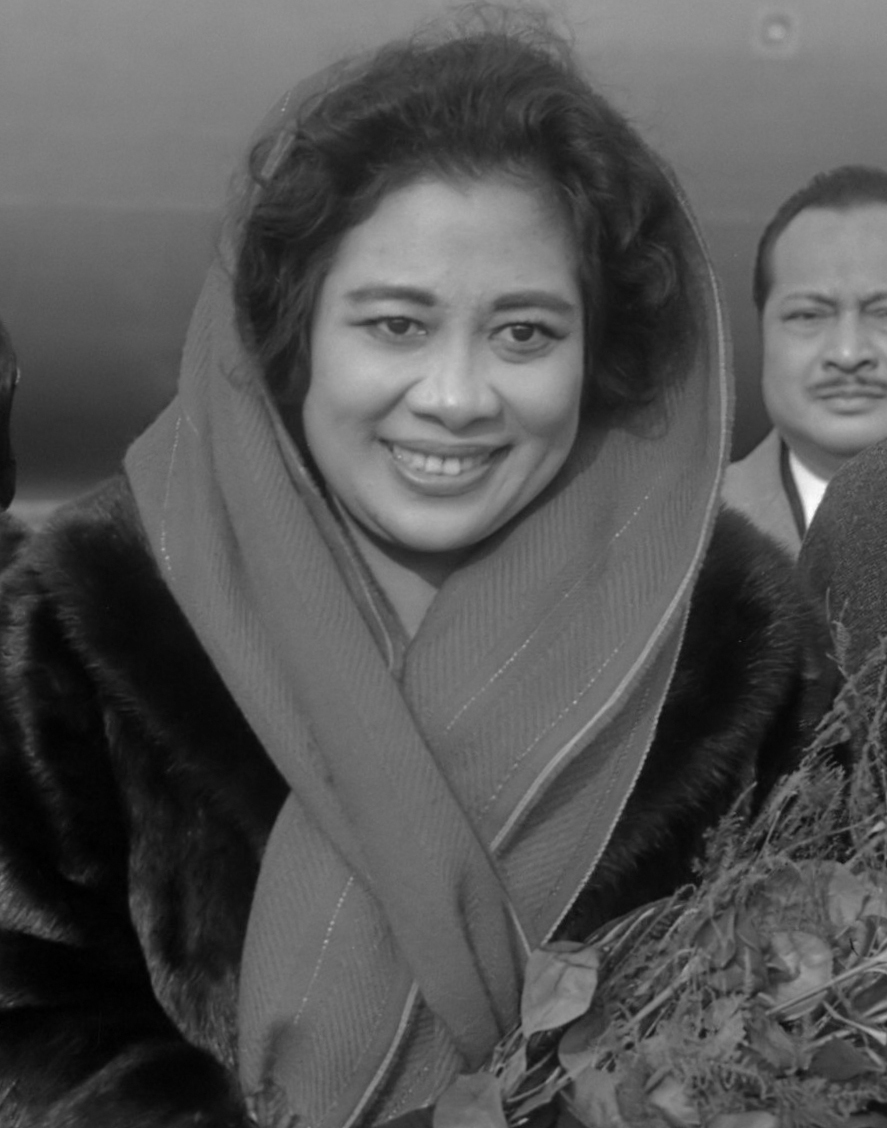 Aankomst van mevrouw Fatmawati Soekarno op Schiphol 5 november 1966